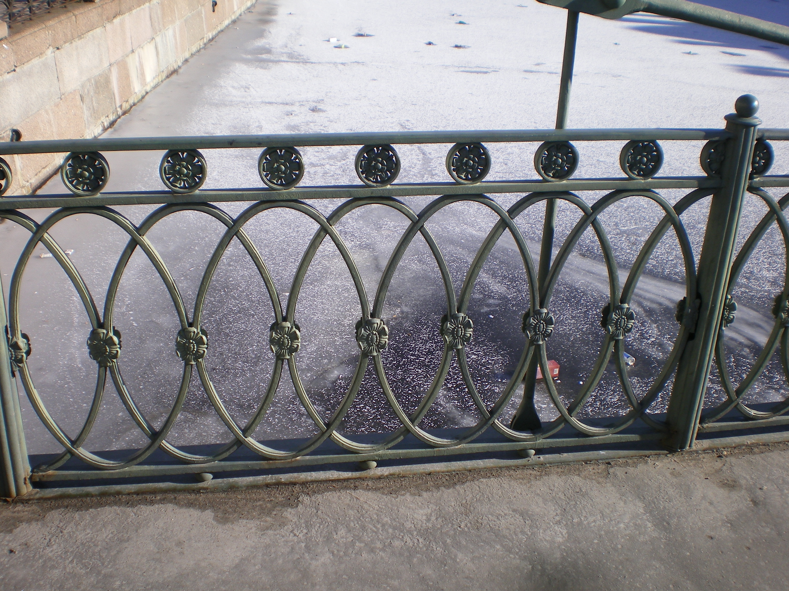 Решётка почтамтского моста в Санкт-Петербурге